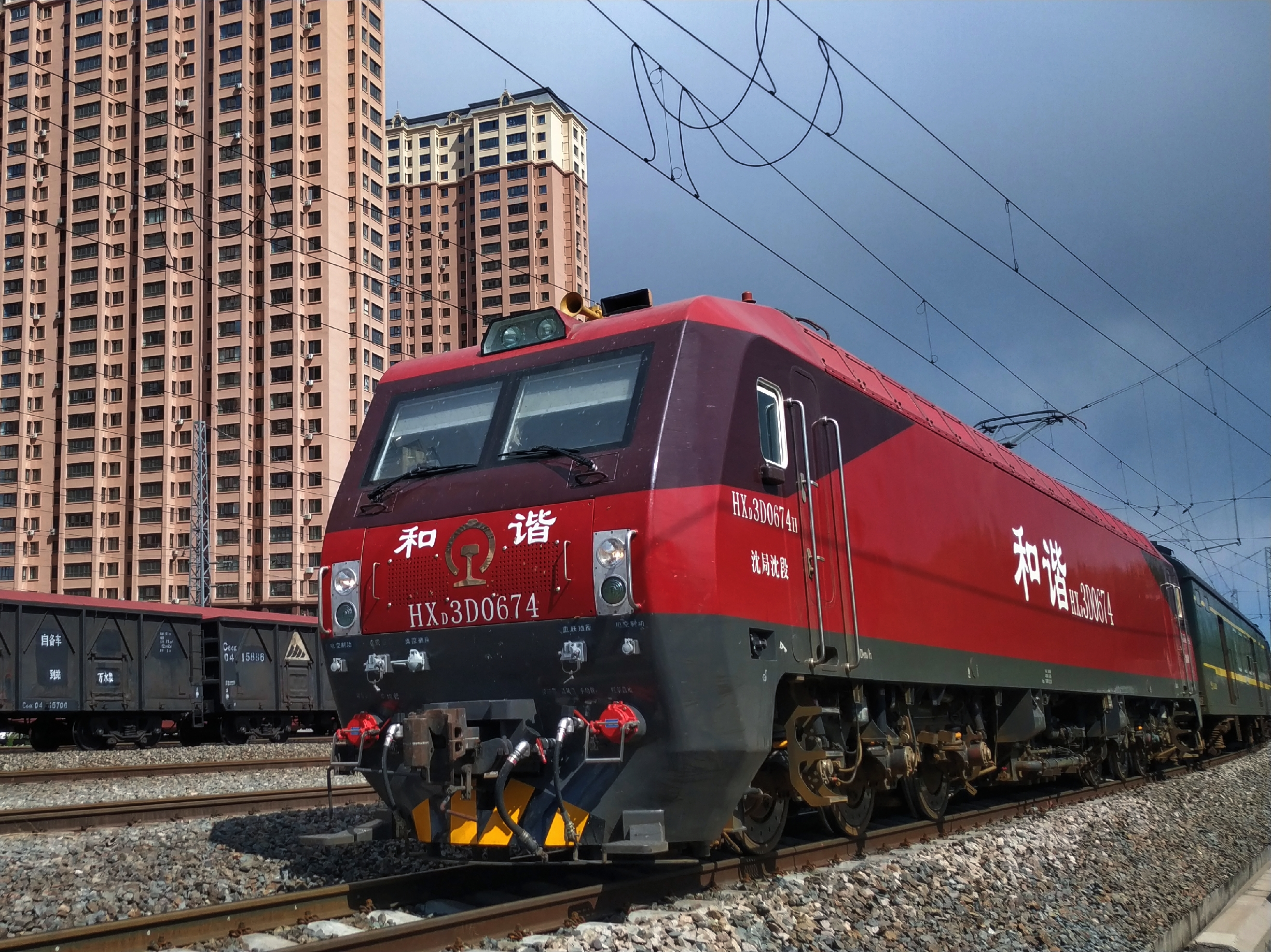 中文（中国大陆）: K554行驶在三棵树铁路东门站段